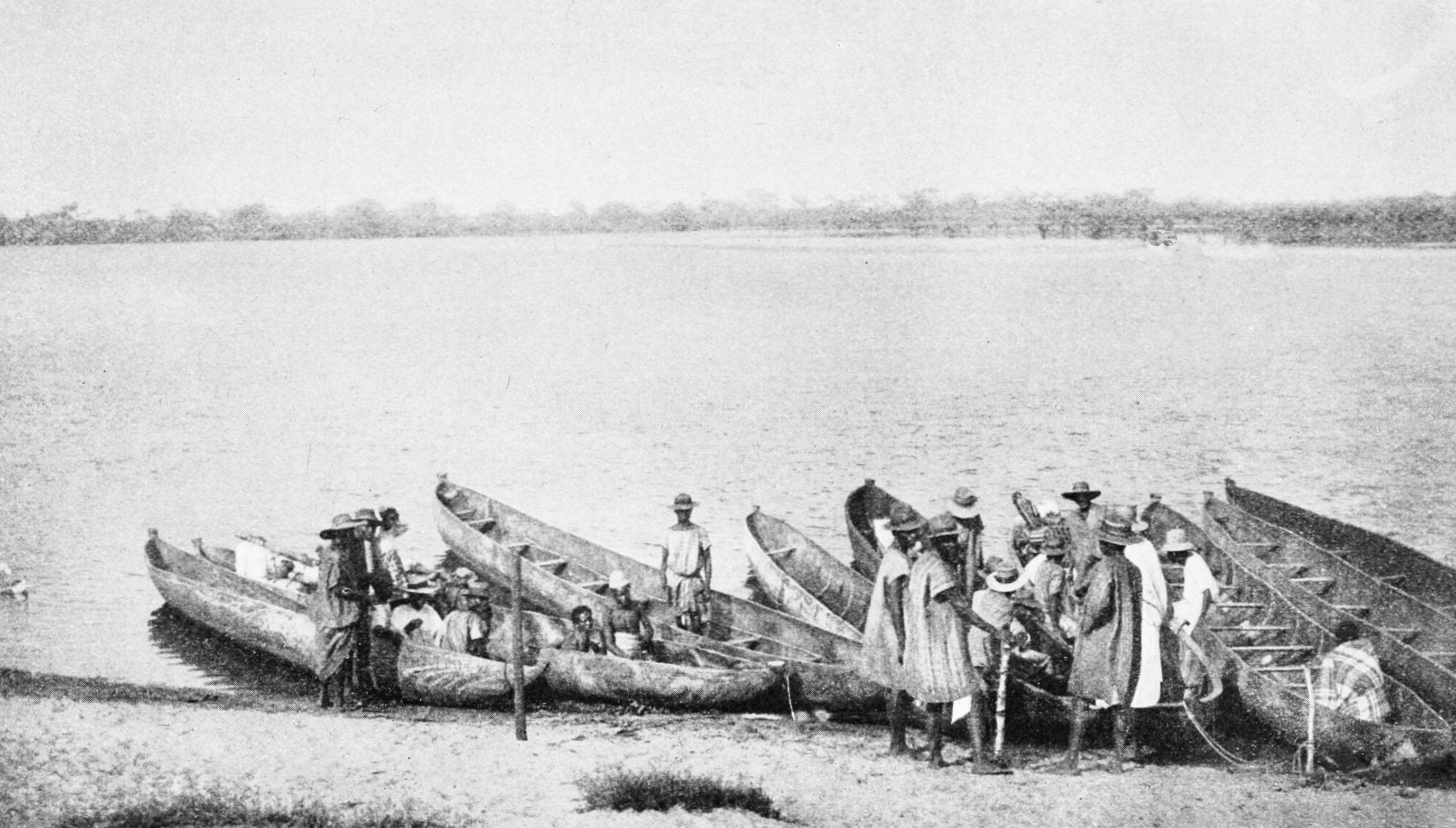 Malagasy canoes